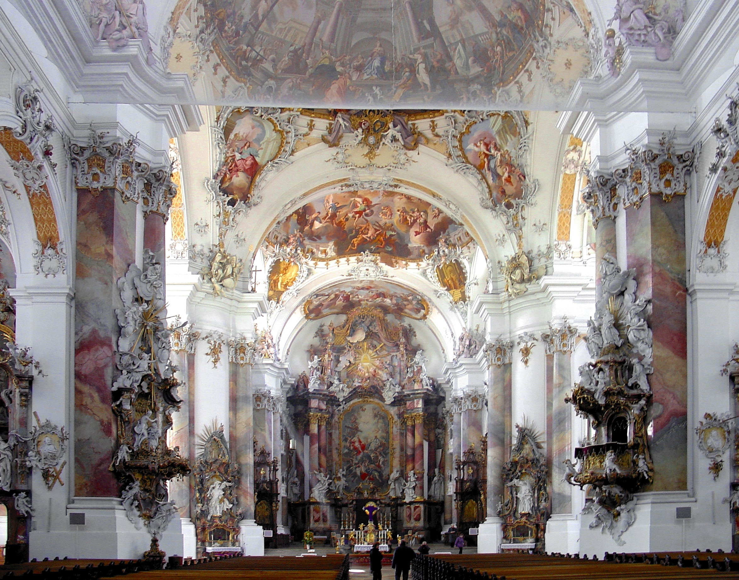 2006-04-02 Allgäu 009 Ottobeuren